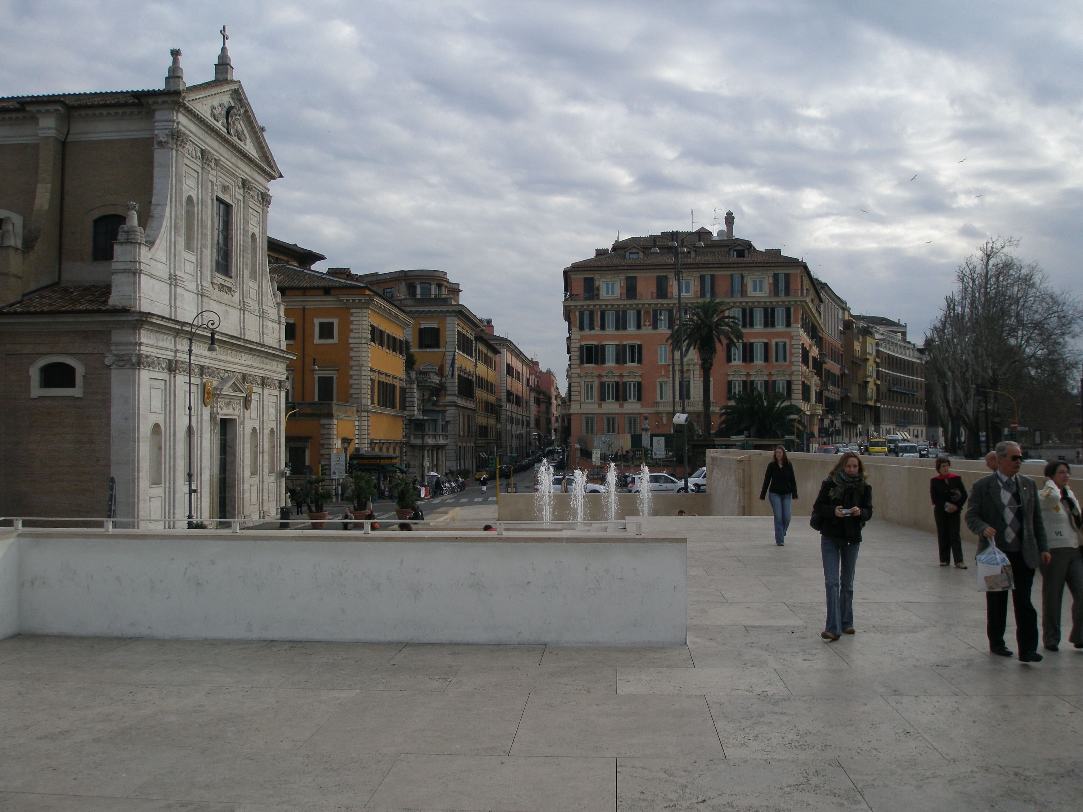 Museo dell'Ara Pacis Augustae, Fontana antistante vista verso Piazza del Porto di Ripetta, Richard Meier, 2006, Roma